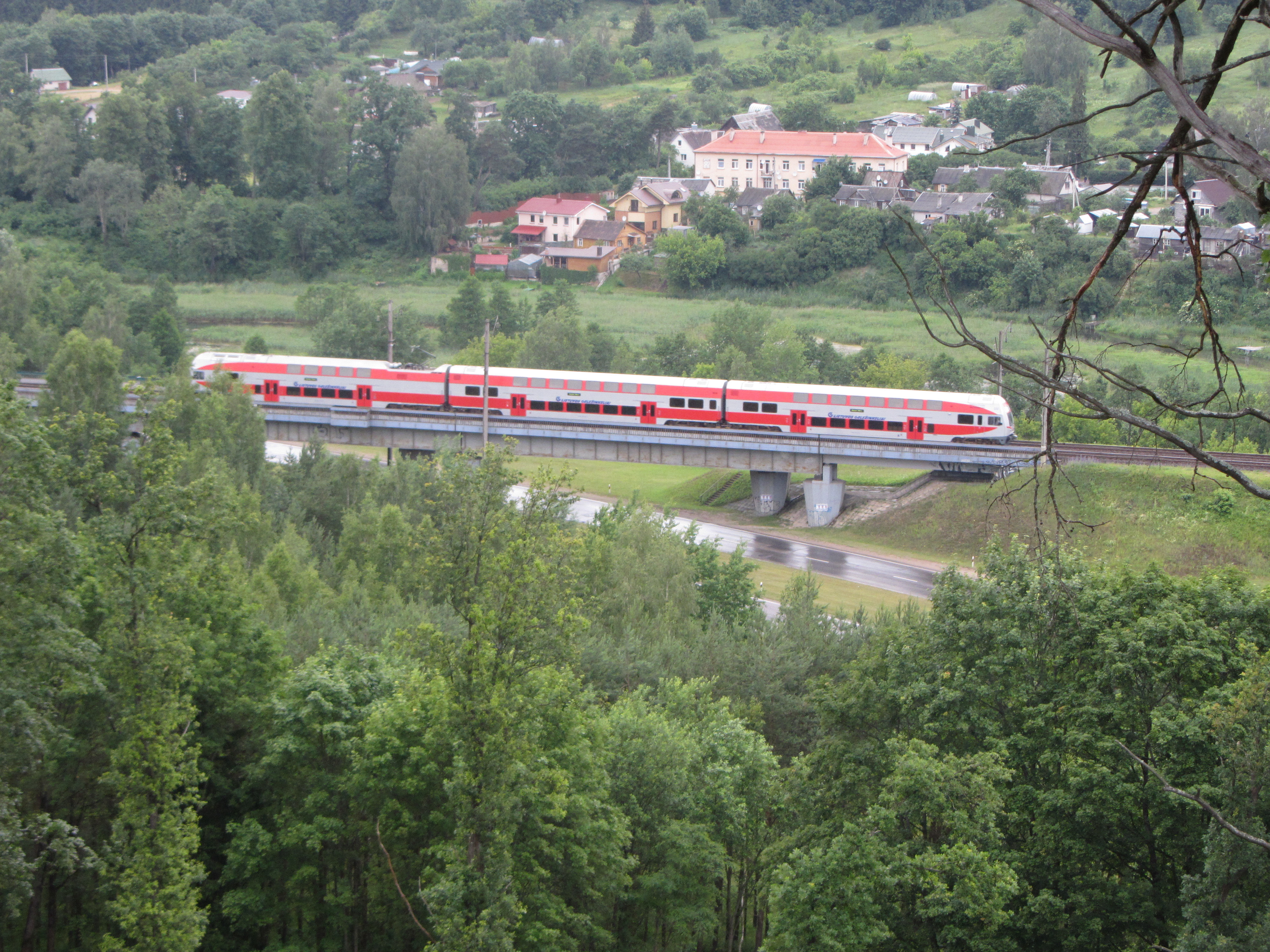 Naujoji Vilnia, Vilnius, Lithuania